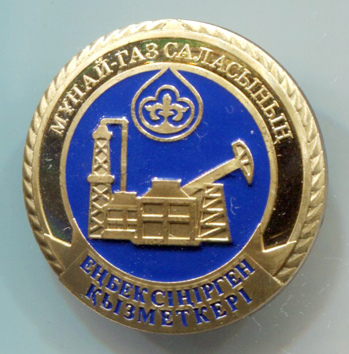 Нагрудный знак "Заслуженный деятель нефтегазовой сферы" (Казахстан)